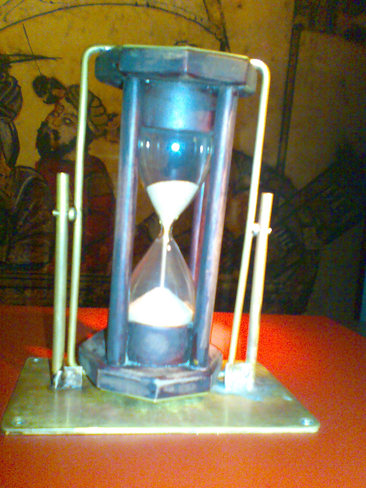 Reloj de arena ubicado en el Parque de las Ciencias de Granada